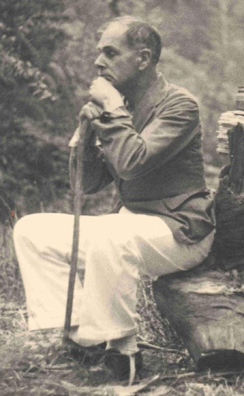 Autoportrait du poète Afonso Lopes Vieira